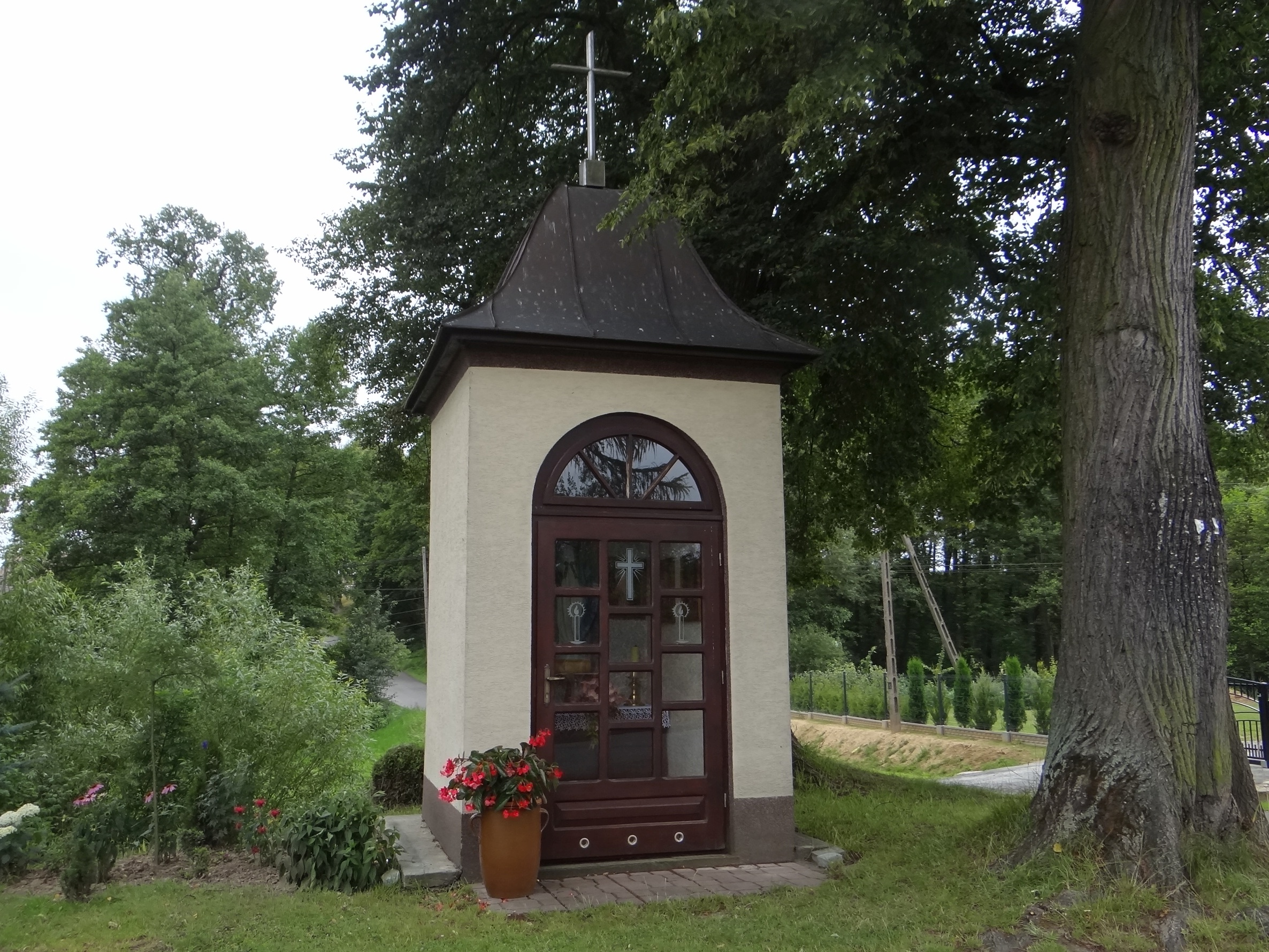 Kapliczka w Buchcicach